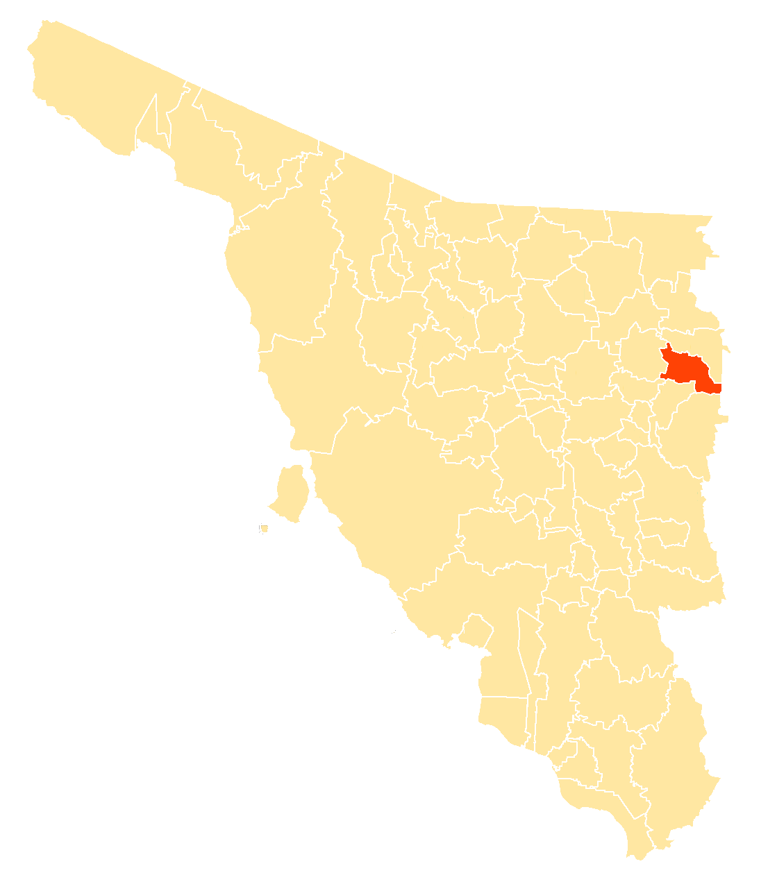 Municipio dentro de Sonora, México.